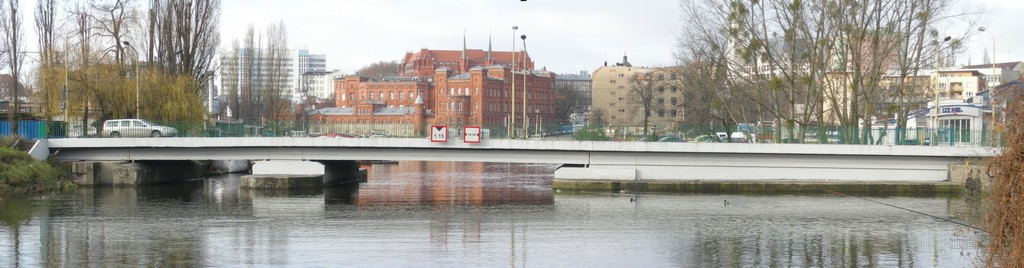 Most Zielony, Szczecin